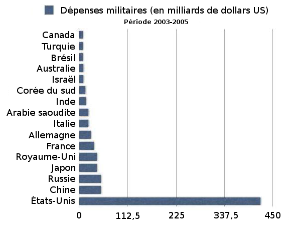 Dépenses militaires (2003-2005) des plus grandes puissances militaires Traduction de cette image : [1]